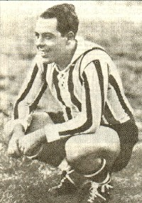 jogador gremista Luiz Carvalho (foto de cerca de 1940)